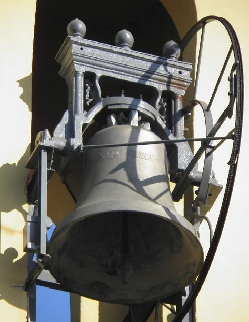 La campana intonata Mi3